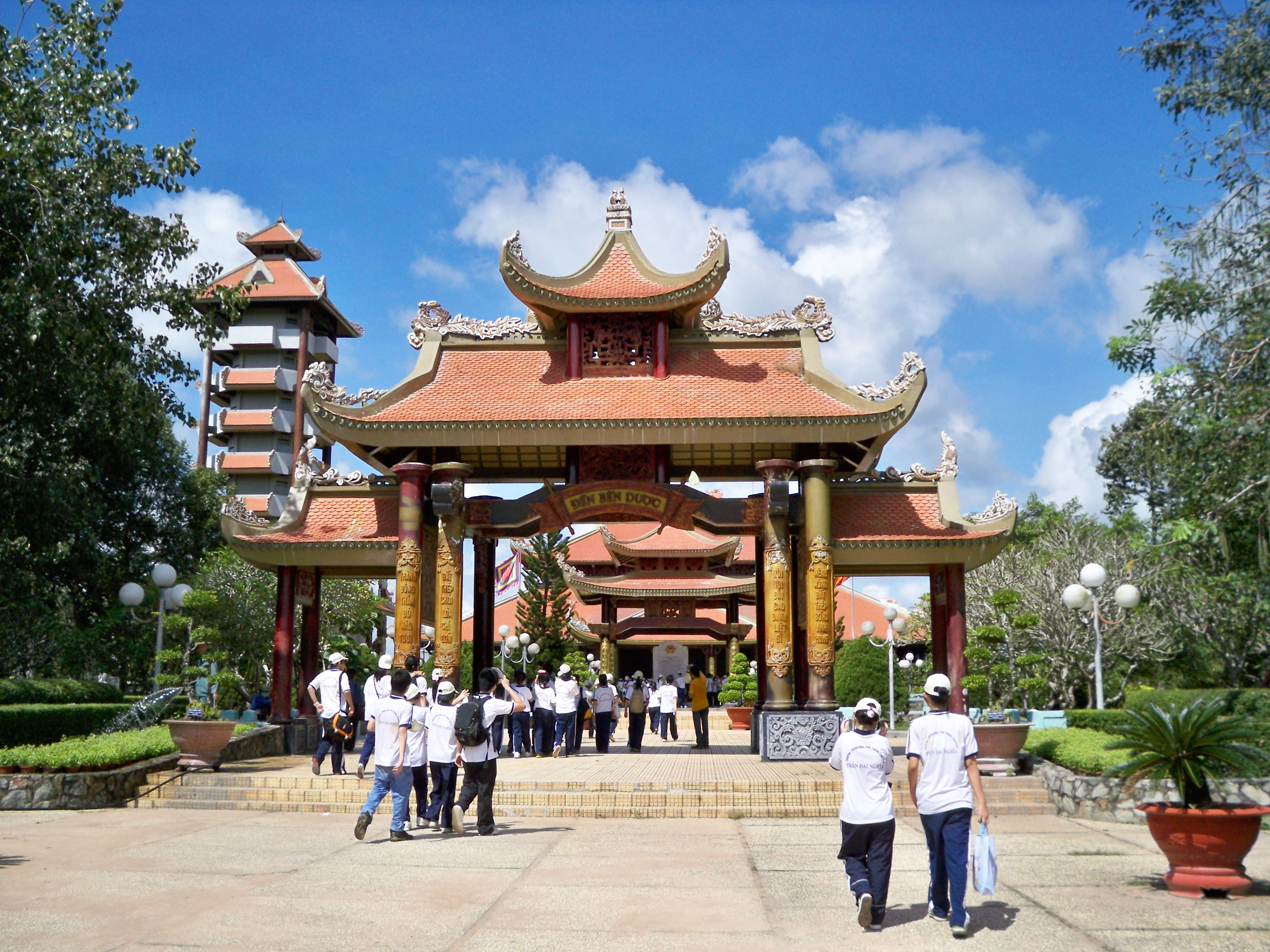 Phan Minh Châu chụp tại đền Bến Dược khảo sát thực tế cùng học sinh trường Trần Đại Nghĩa